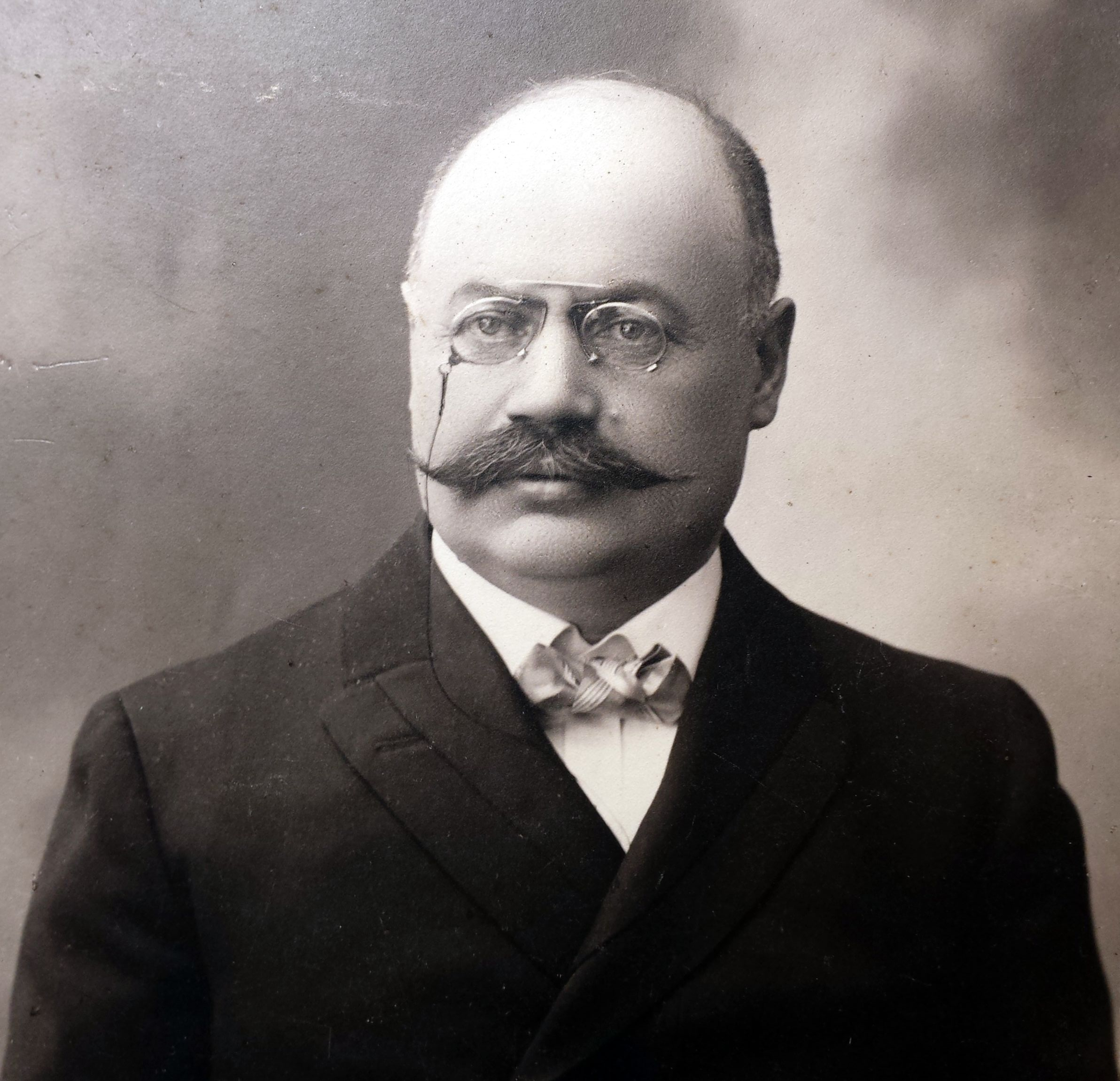 Teisininkas, tarpukario ministras Bernardas Fridmanas